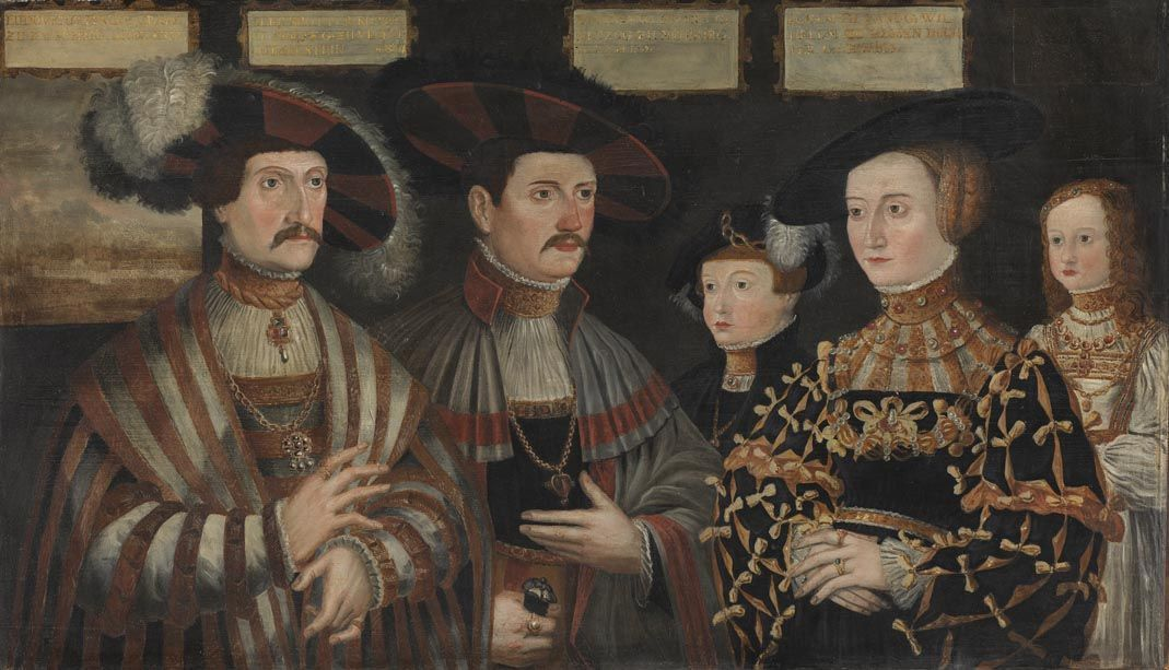 Pfalzgraf Ludwig II. von Zweibrücken-Veldenz mit seiner Familie und seinem Bruder Ruprecht